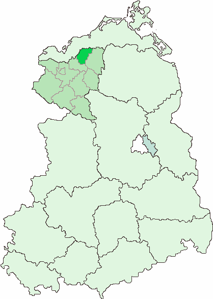 Skizze freihand erstellt Rauenstein 22:33, 6. Sep 2006 (CEST) HINWEIS: vorerst nicht für commons bestimmt.